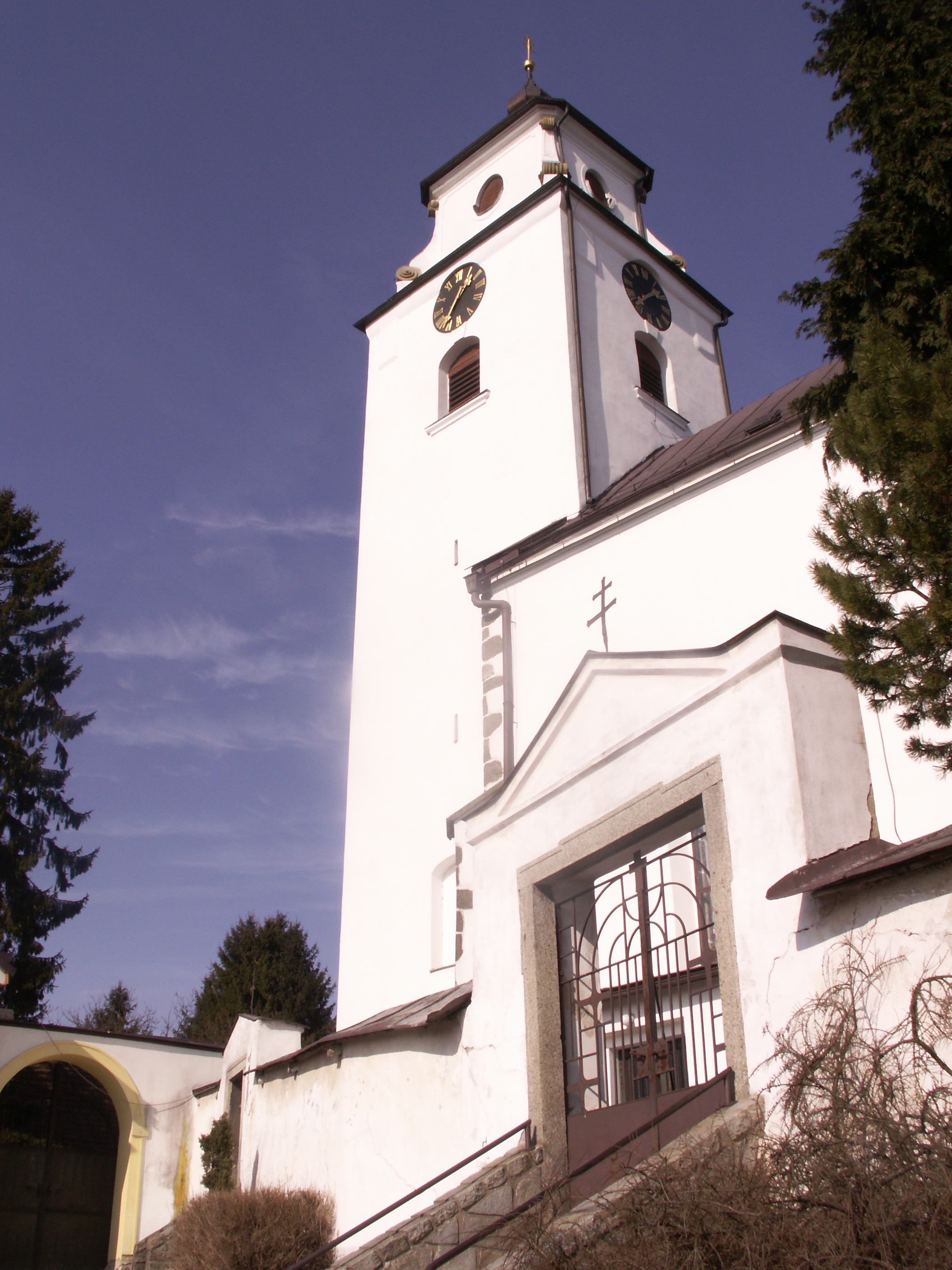 kostel Nanebevzetí P. Marie v Nížkově, okres Žďár nad Sázavou, kraj Vysočina